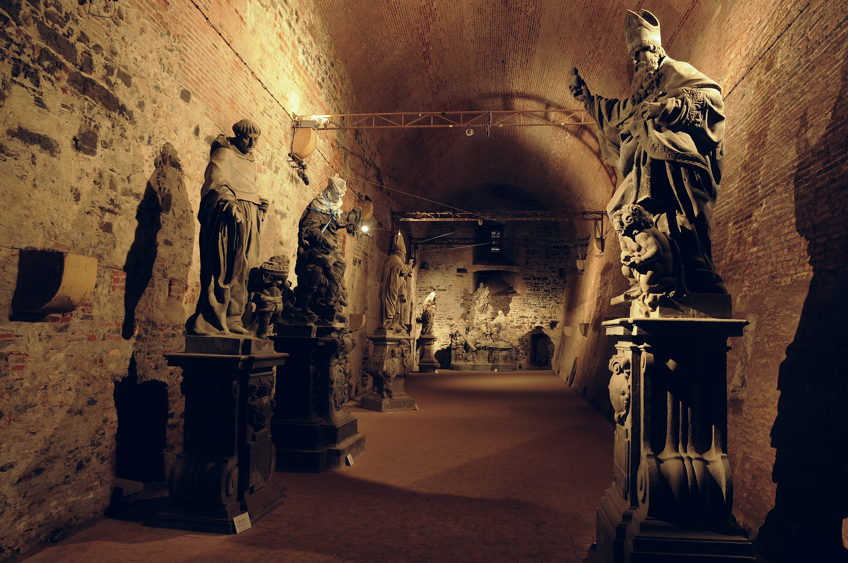 Interiér sálu Gorlice. Vyšehrad.